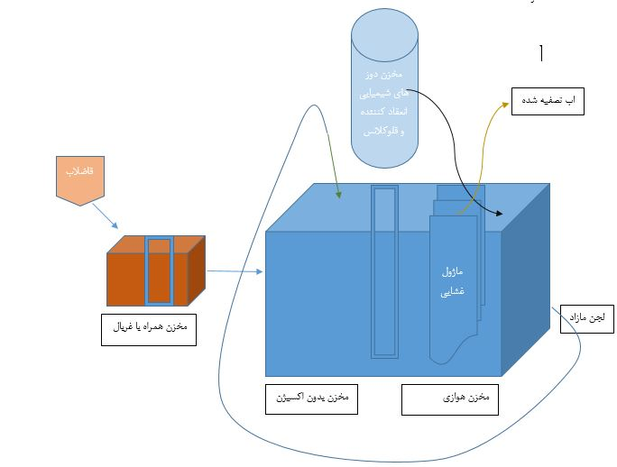 شمایی از یک بایوراکتور غشایی